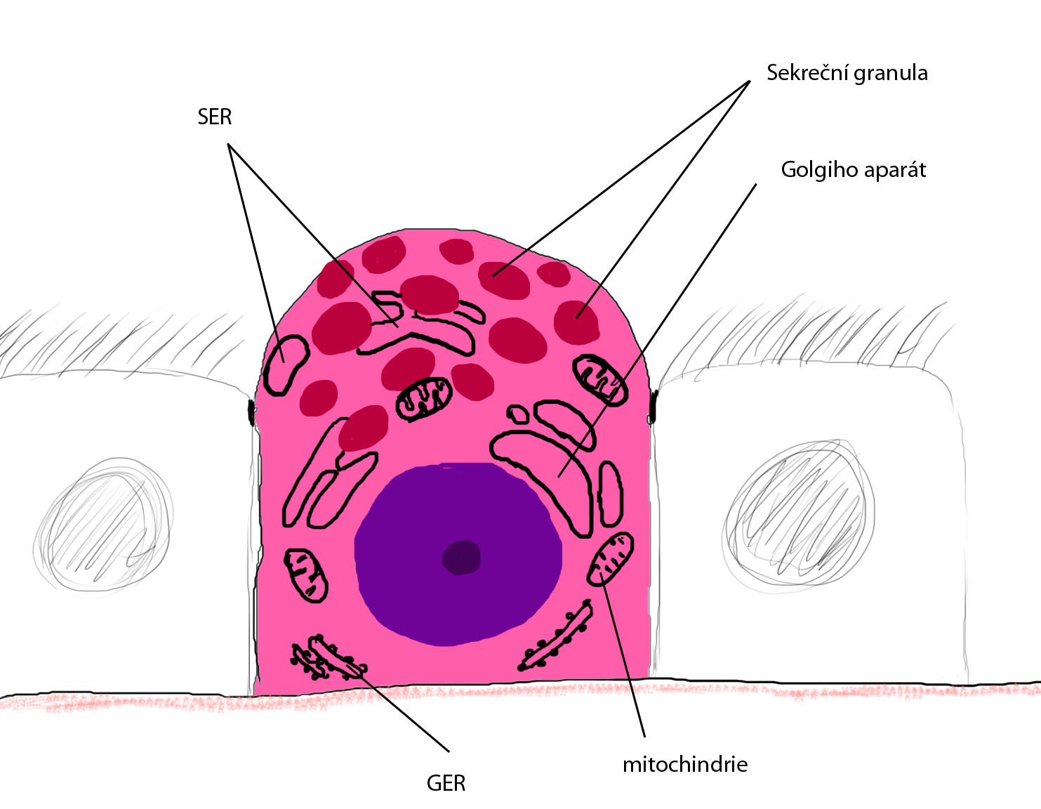 Schematické znázornění Clarovy buňky v terminálním bronchiolu (průdušince). Vedle ní jsou epitelární buňky s řasinkami.